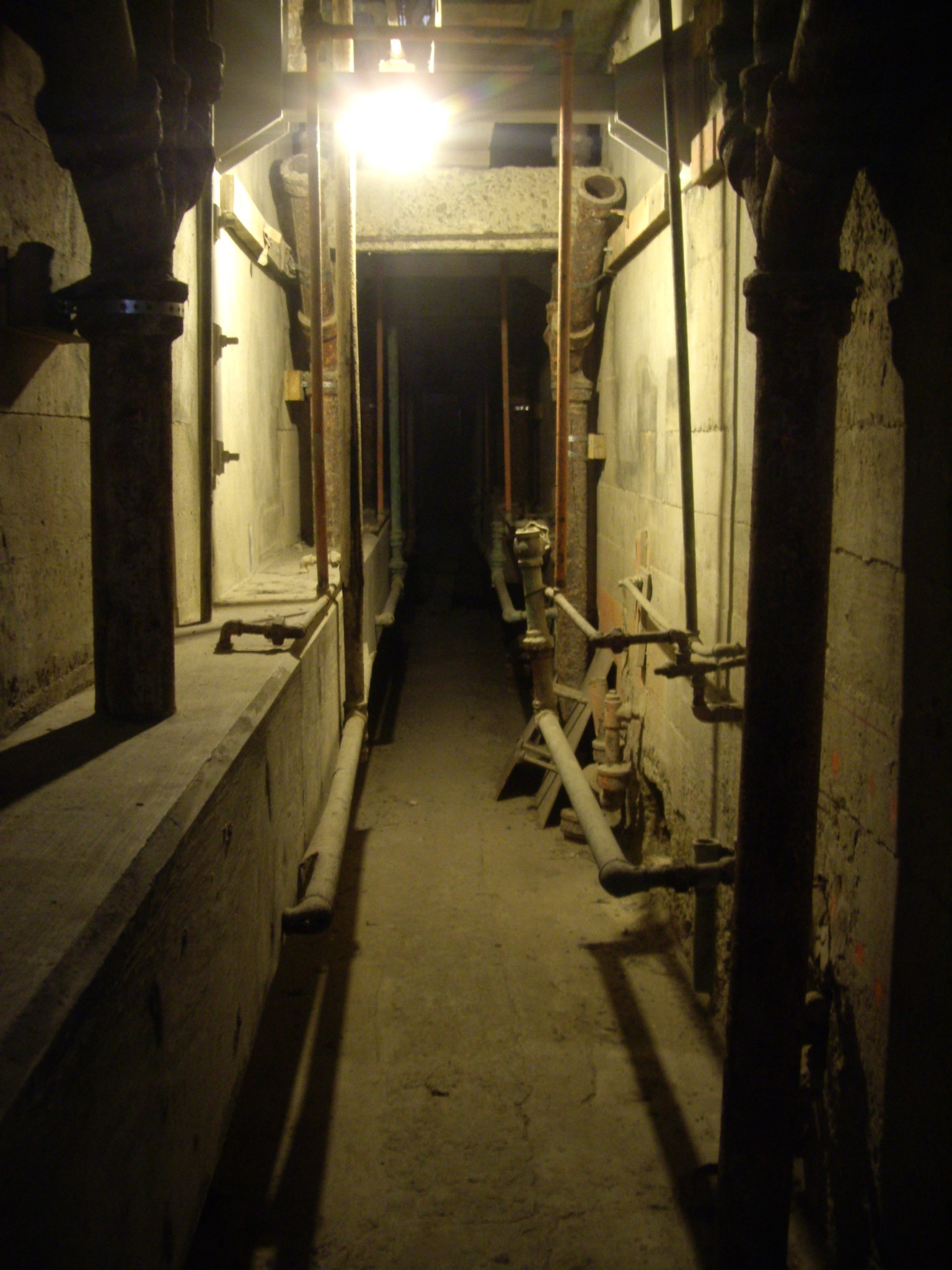 June 1962 Alcatraz escape